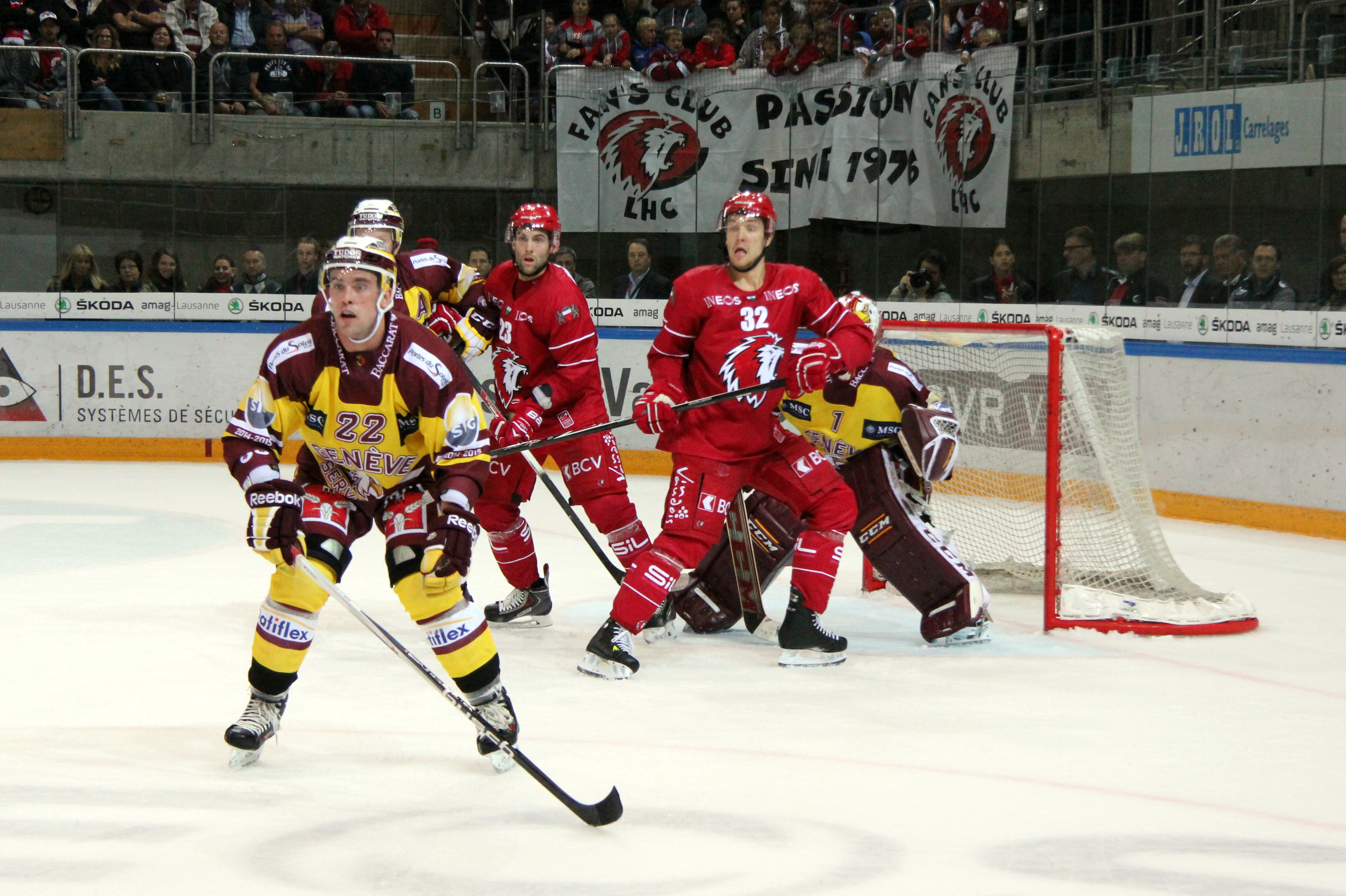 Jonathan Mercier (G 22), Daniel Vukovic (G 55), Alain Miéville (L 23), Ossi Louhivaara (L 32), Christophe Bays (G 1).